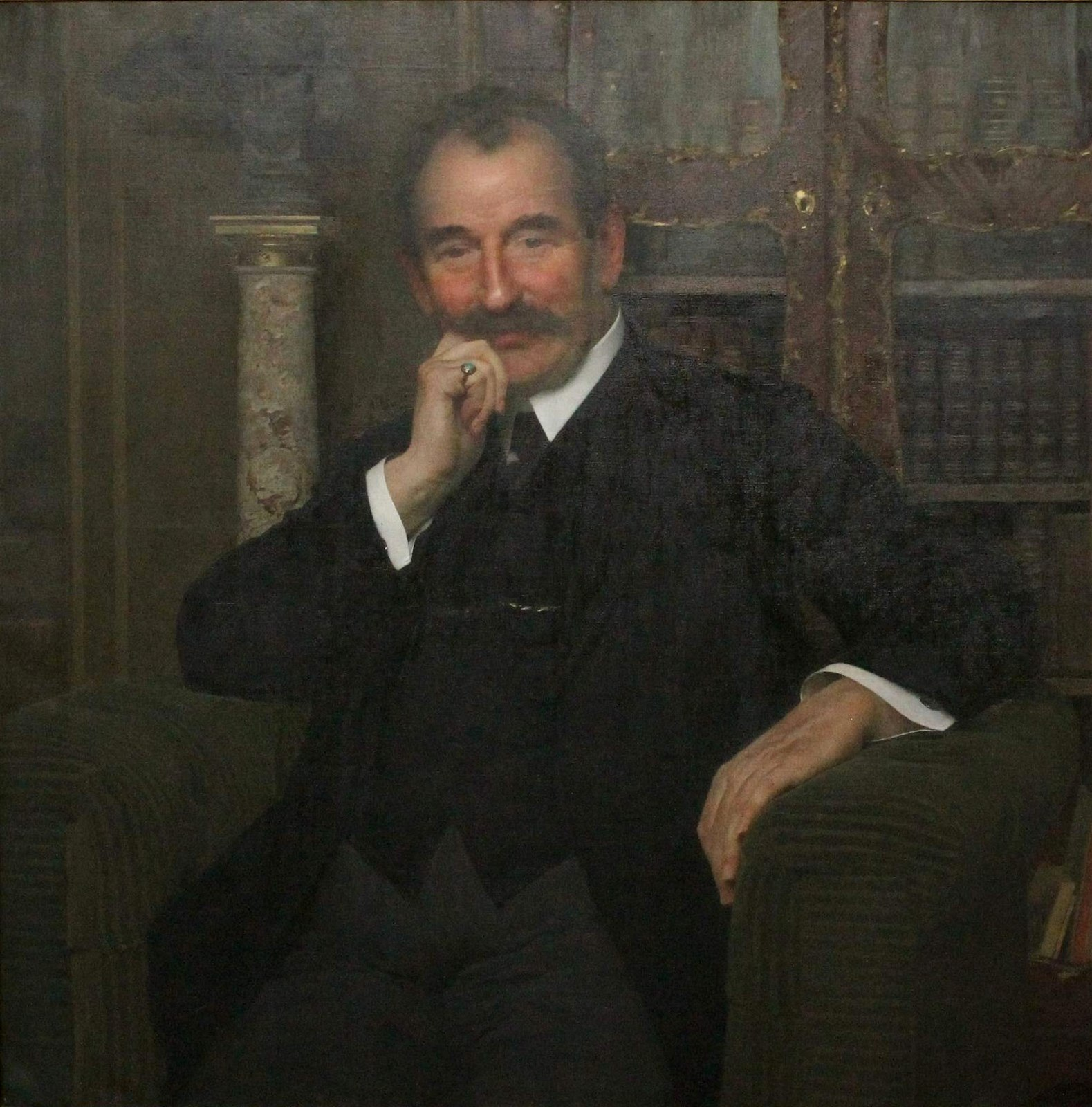 JUDr.Leopold Katz (1854-1927), čs.advokát, významný mecenáš čs.vědy a umění